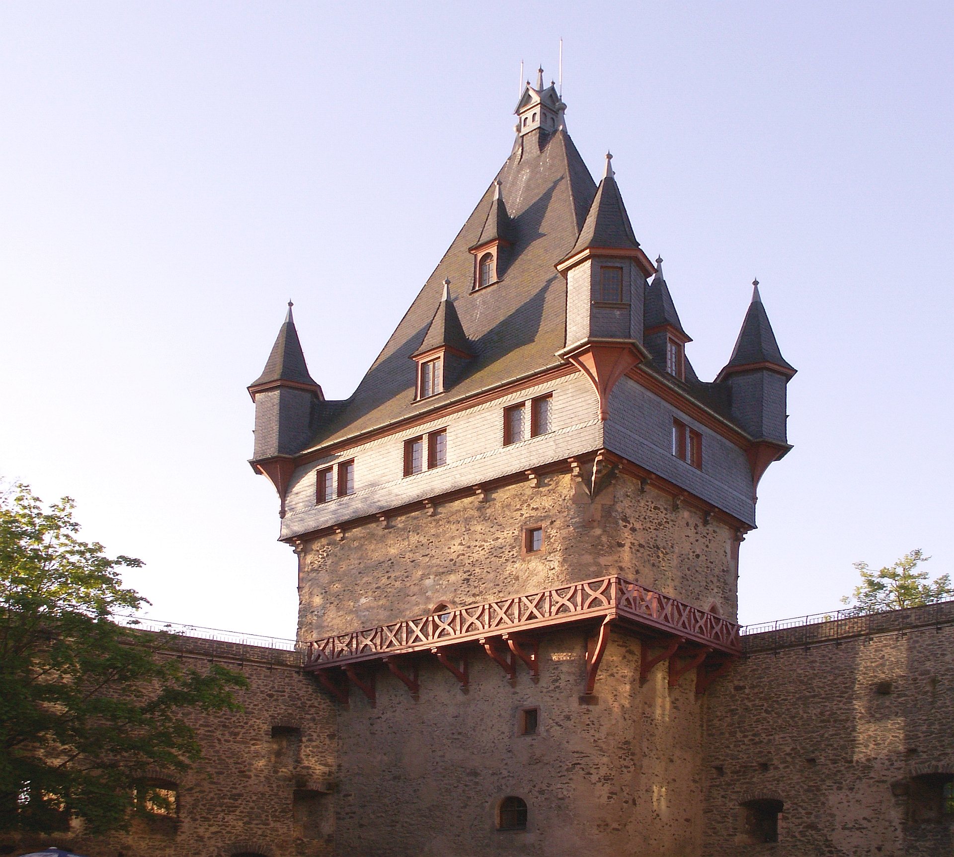 Schloss Romrod - der Kanzleiturm mit oberem Fachwerkausbau (von Innenseite der Schlossanlage), Hessen Germany - Foto 2008 Wolfgang Pehlemann PICT0143